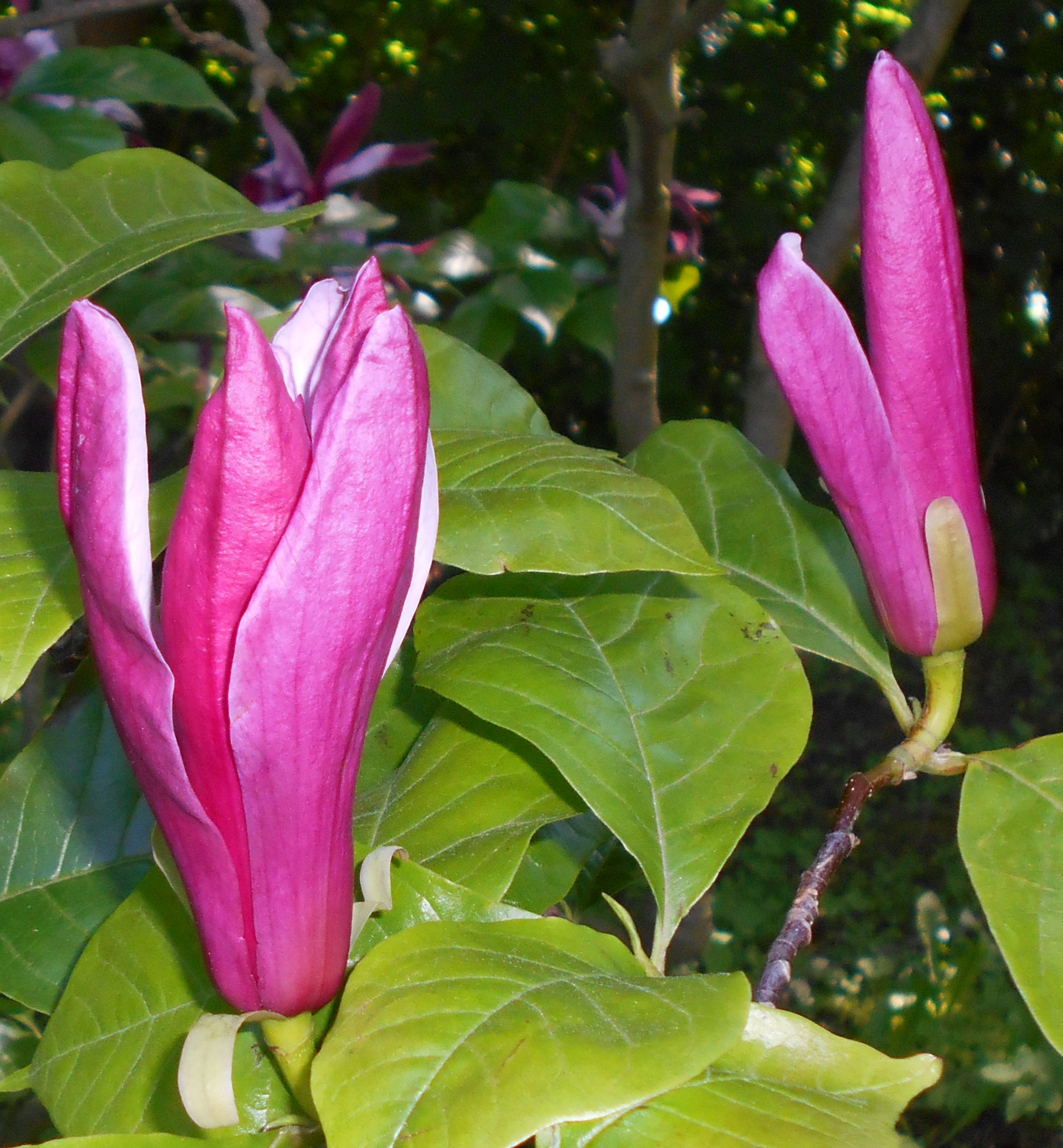 Magnolia purpurowa (Magnolia liliiflora), Ogród Botaniczny UMCS w Lublinie